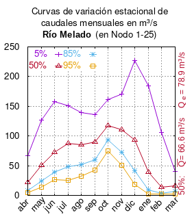 Curvas de variación estacional del río Melado en el nodo 1-25. # Dirección General de Aguas # Evaluación de los recursos hídricos superficiales de la cuenca del río Maule. # Santiago de Chile # Ministerio de Obras Públicas (Chile) # 2005 # url: # urlarchivo: # Caudales medios mensuales en Punto de Control N° 3, Q (l/s), p.36 [valores convertidos a m3/s] mes 5% 50% 85% 95% abr 66.972 22.436 8.517 4.265 may 127.182 50.921 23.659 14.053 jun 157.612 72.408 39.471 27.006 jul 150.462 87.633 48.045 24.803 ago 138.893 85.391 51.679 31.889 sep 135.951 89.539 60.296 43.126 oct 161.382 117.511 93.182 74.772 nov 170.278 110.269 72.461 50.264 dic 226.665 93.325 41.764 18.371 ene 184.287 39.518 8.835 2.707 feb 105.925 14.106 3.961 1.880 mar 40.049 15.899 6.559 2.320 This plot was created with Gnuplot.